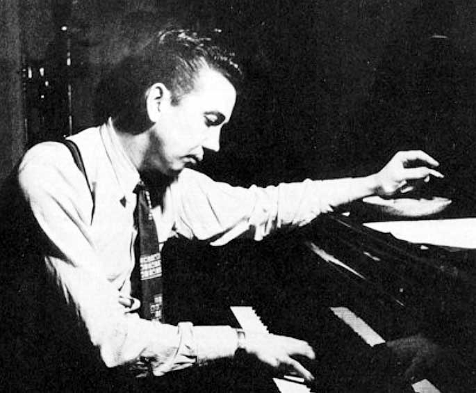 Gösta Theselius